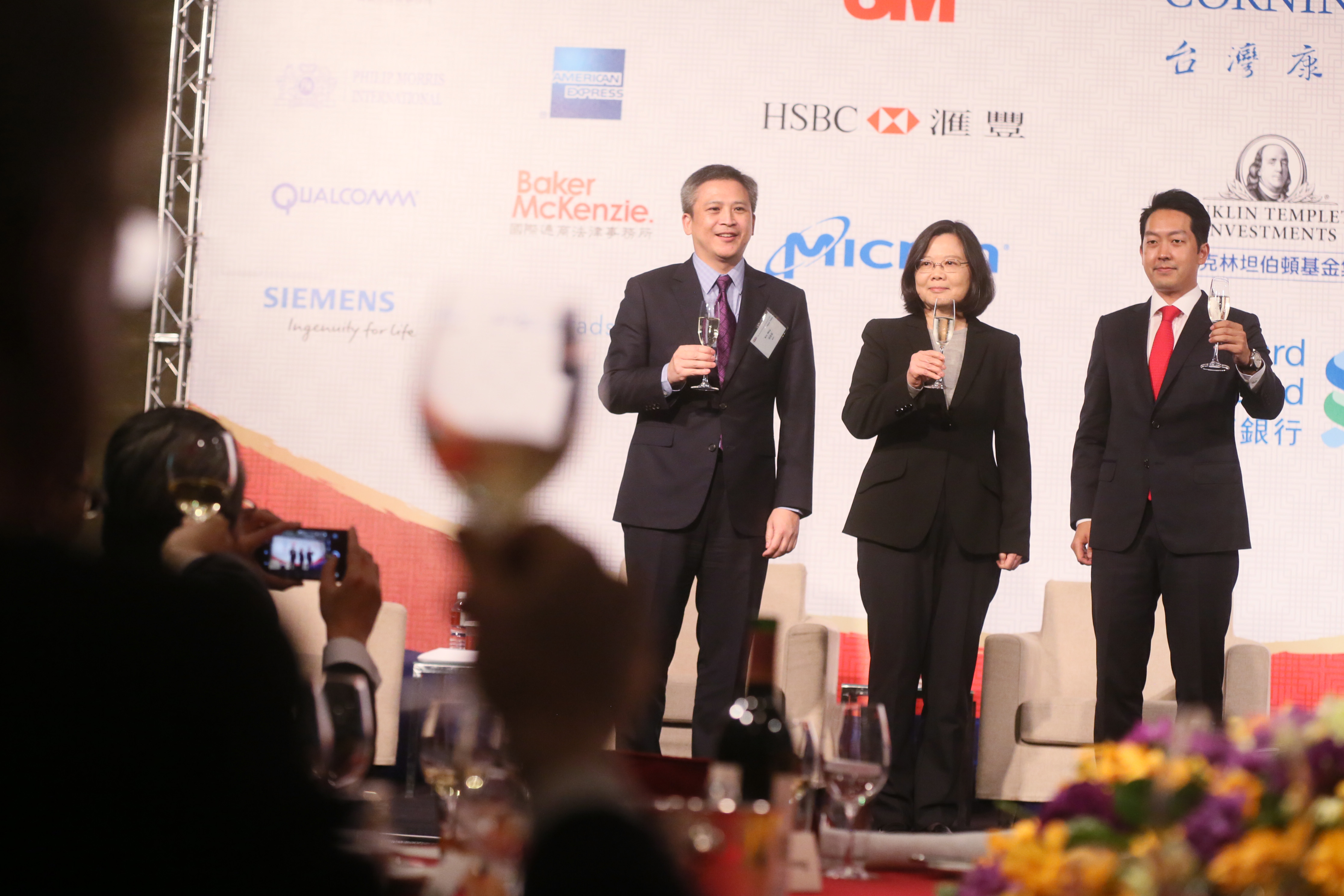 中華民國總統蔡英文總統出席「台北市美國商會2017謝年飯」，與台北市美國商會會長章錦華及美國在台協會台北辦事處處長梅健華舉杯祝賀，共同見證台美情誼。